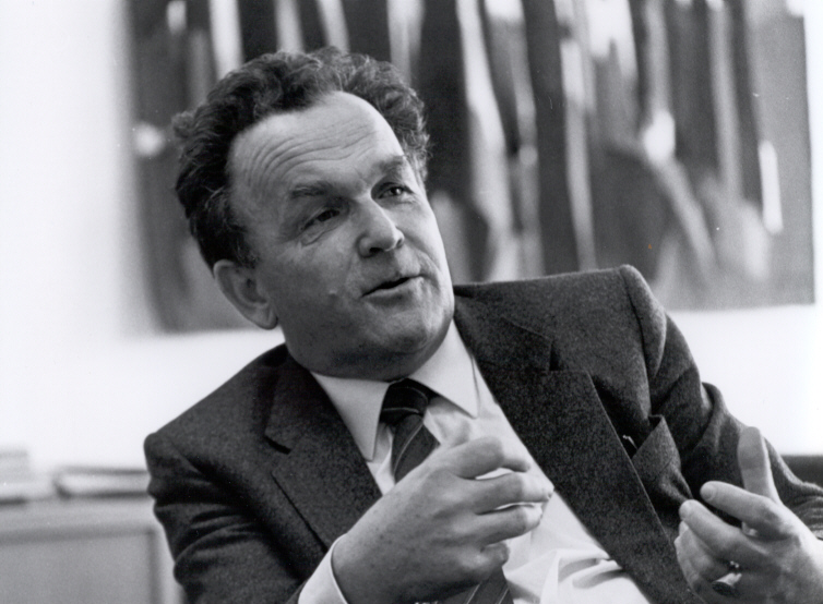 Otto Stich, Schweizer Bundesrat